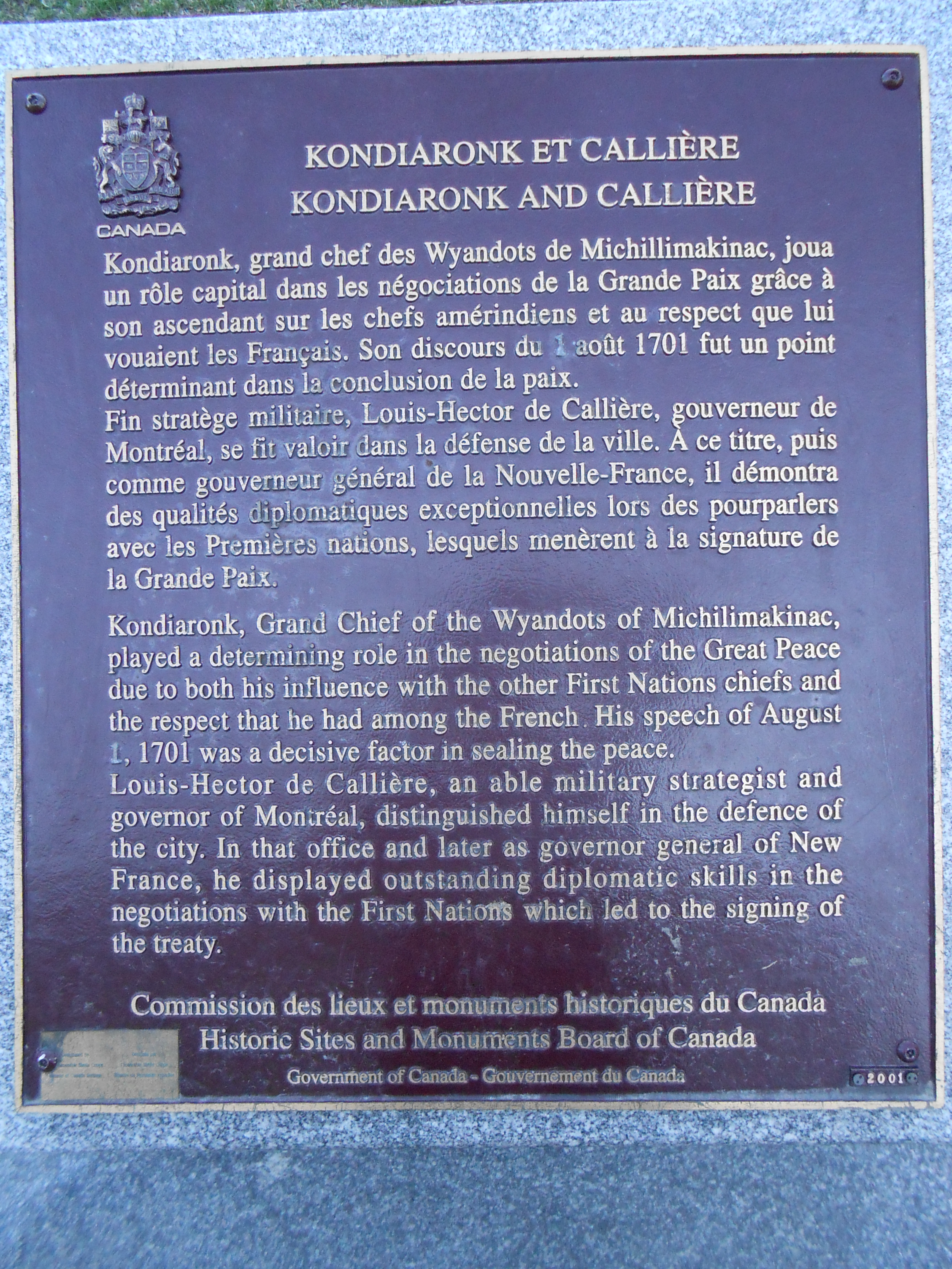 Plaque Kondiaronk et callière, Place de la Grande-Paix-de-Montréal. On peut y lire : « Kondiaronk, grand chef des Wyandots de Michillimakinac, joua un rôle capital dans les négociations de la Grande Paix de Montréal grâce à son ascendant sur les chefs amérindiens et au respect que lui vouaient les Français. Son discours du 1 août 1701 fut un point déterminant dans la conclusion de la paix. Fin stratège militaire, Louis-Hector de Callière, gouverneur de Montréal, se fit valoir dans la défense de la ville. À ce titre, puis comme gouverneur général de la Nouvelle-France, il démontra des qualités diplomatiques exceptionnelles lors des pourparlers avec les Premières nations, lesquels menèrent à la signature de la Grande Paix. »